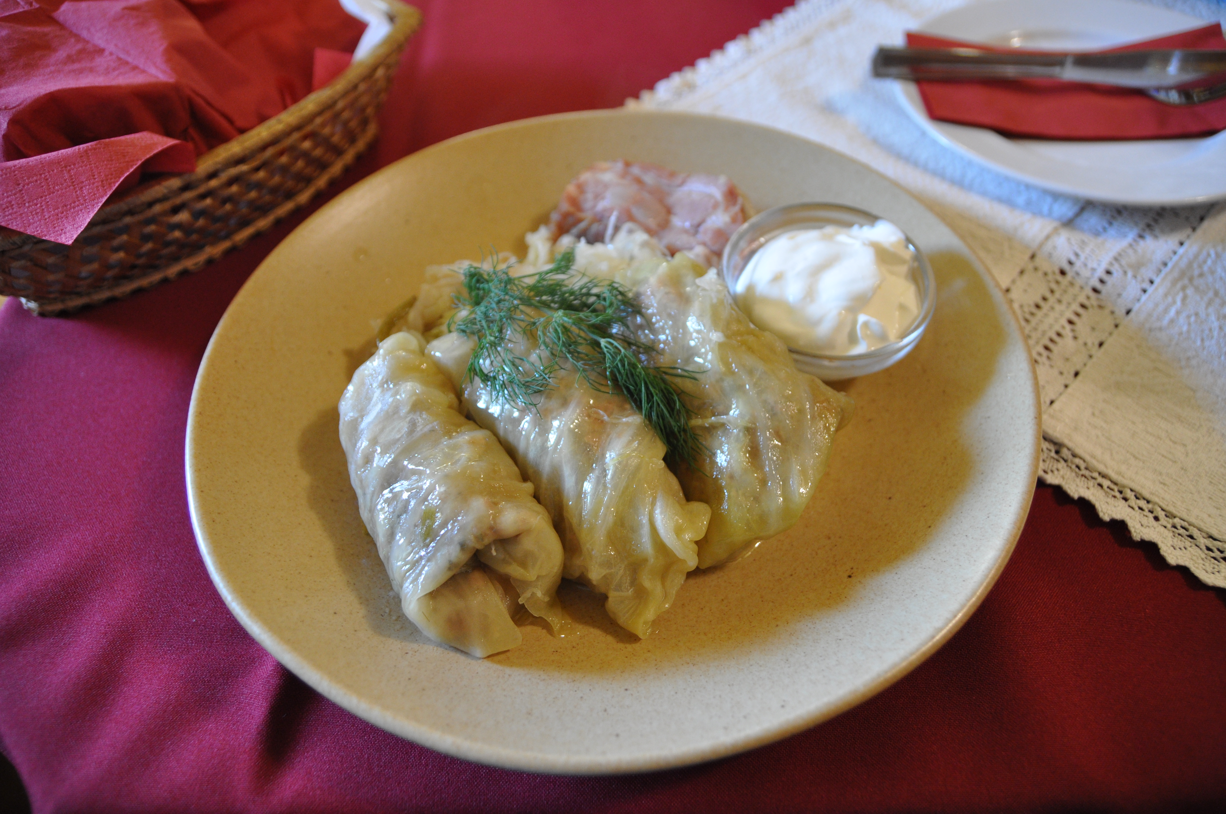 Budapest, Fenyőcske Vendéglő, töltött káposzta